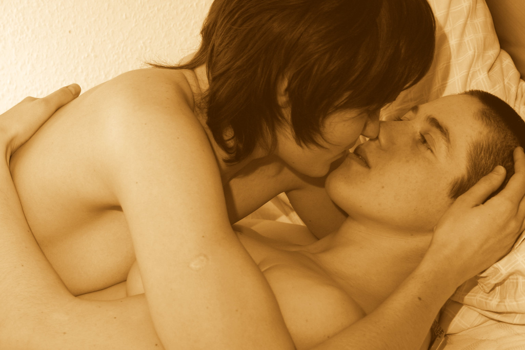 Lesbische Zärtlichkeit im Bett